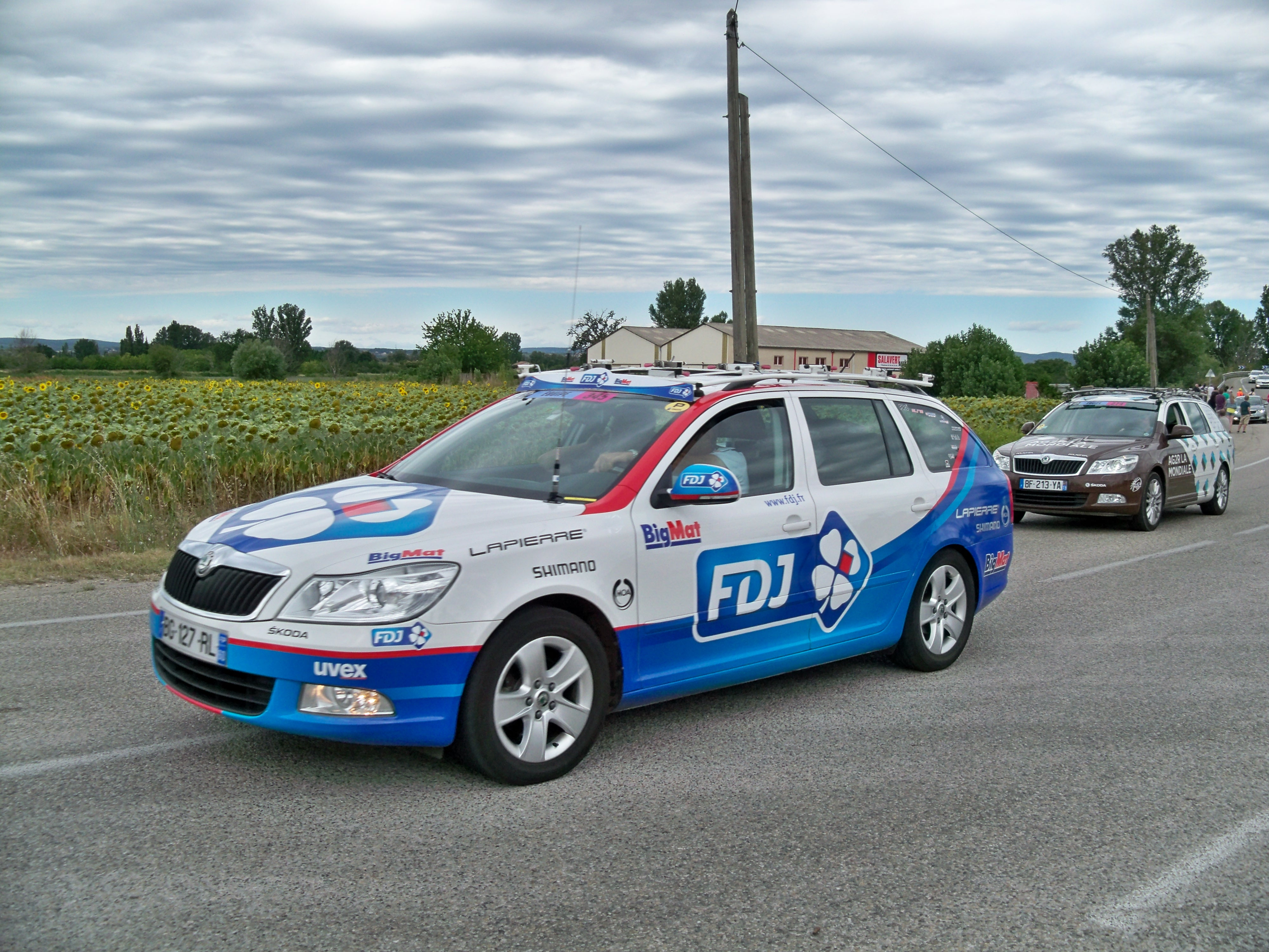 véhicule de l'équipe FDJ sur le Tour de France 2012